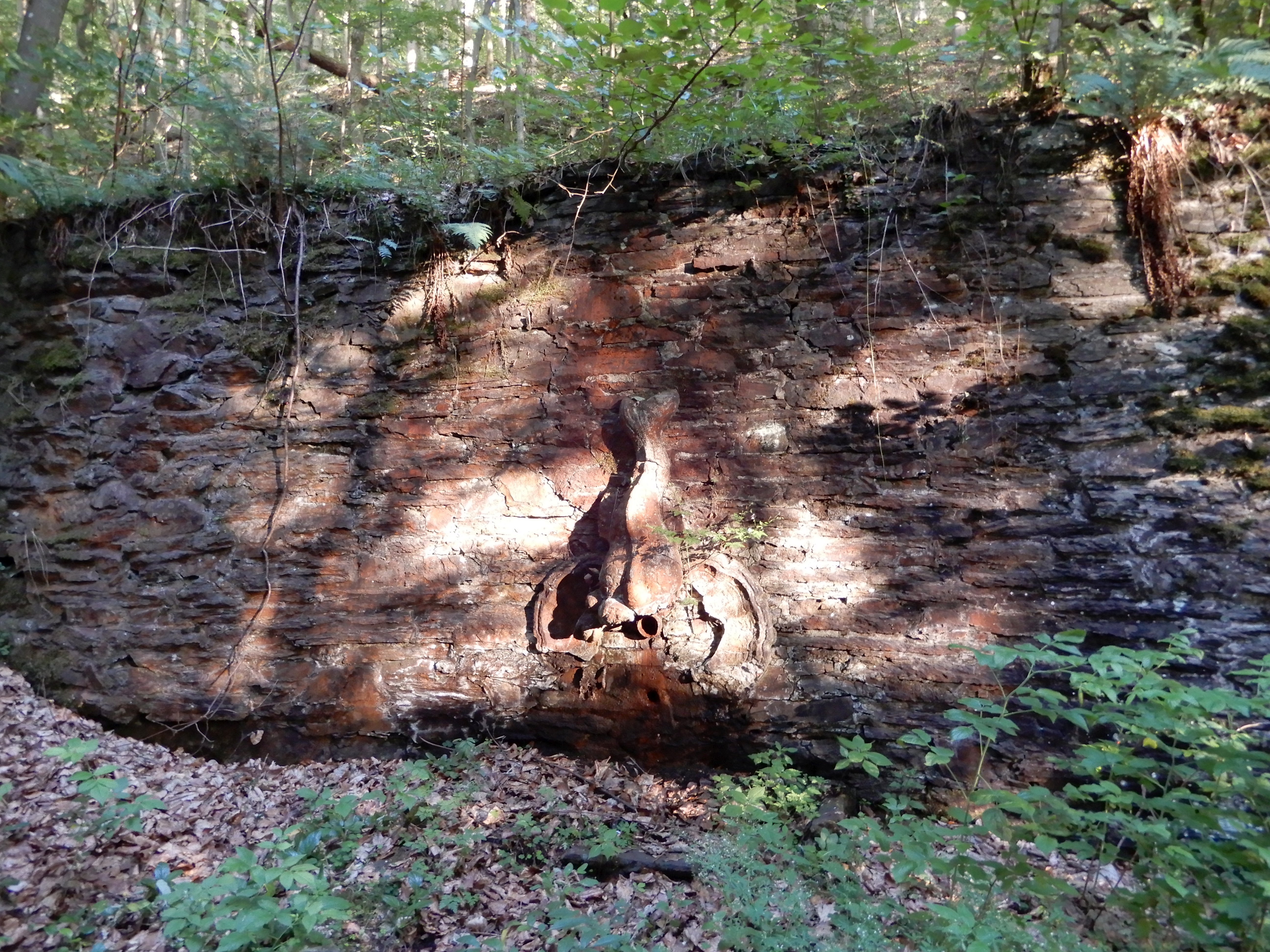 Alexisbrunnen am ehemaligen St. Catharinenstollen bei Alexisbad